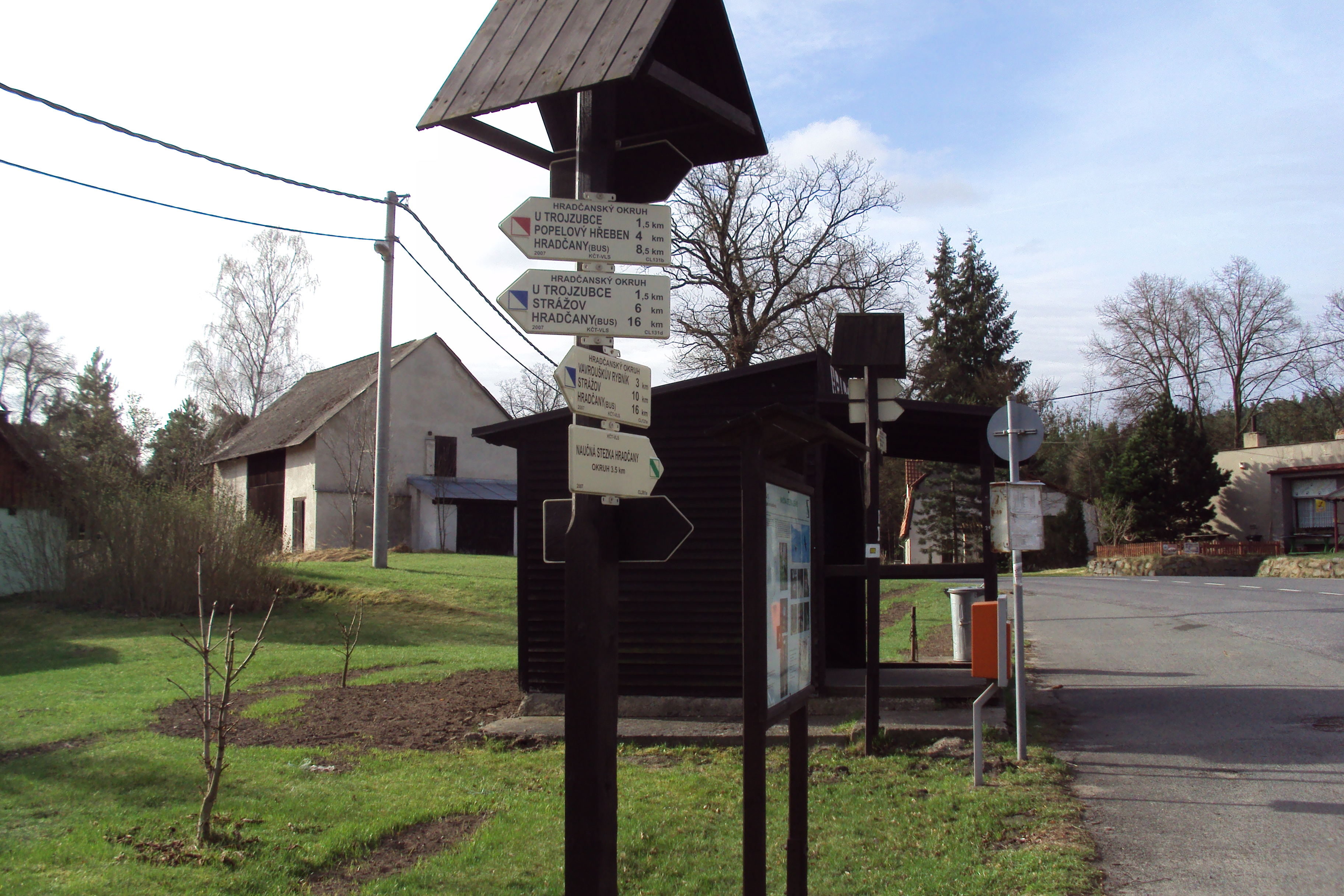 Rozcestník uprostřed obce Hradčany